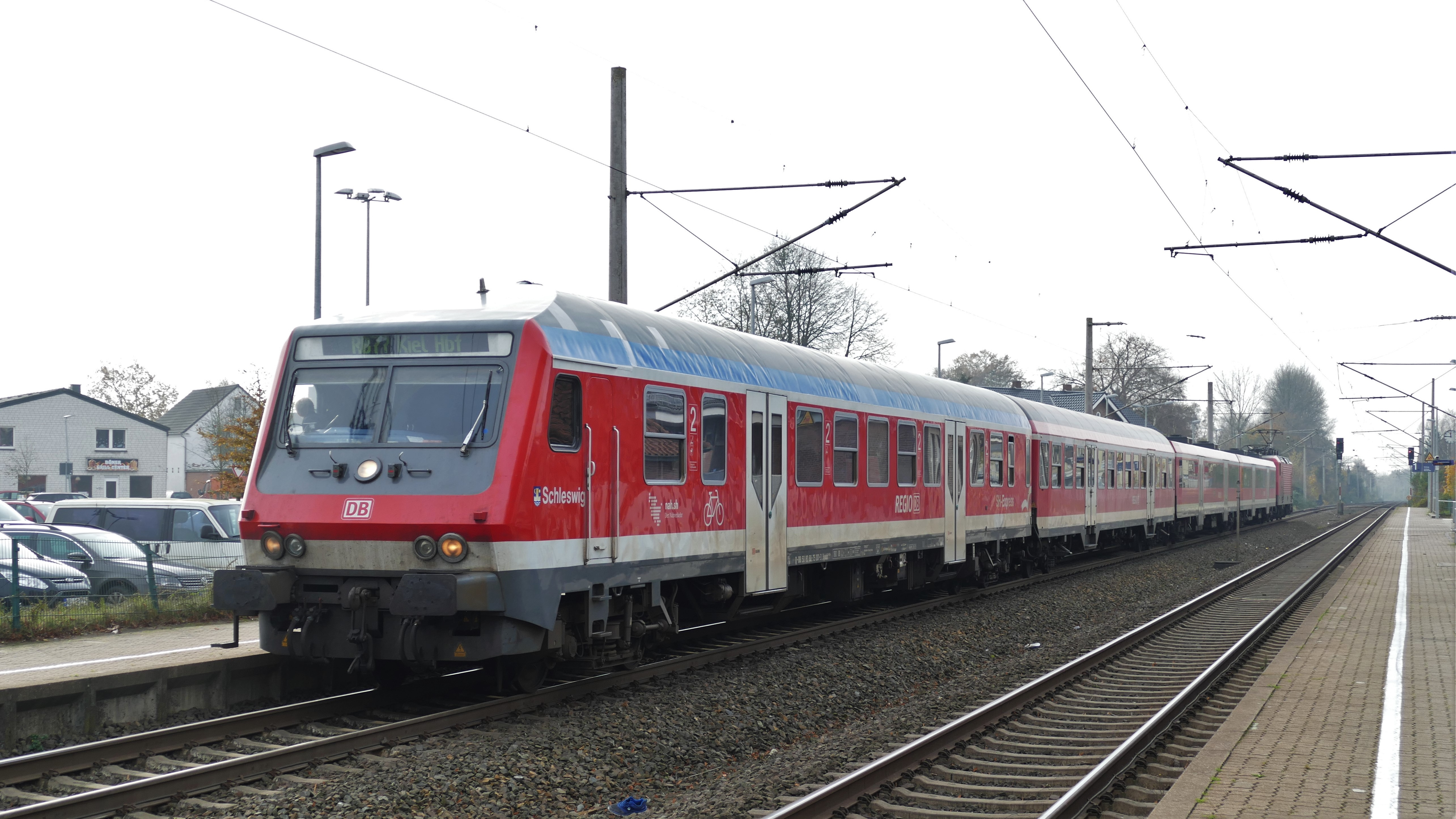 Steuerwagen der Bauart Bybdzf 482.4 der Regionalbahn Schleswig-Holstein